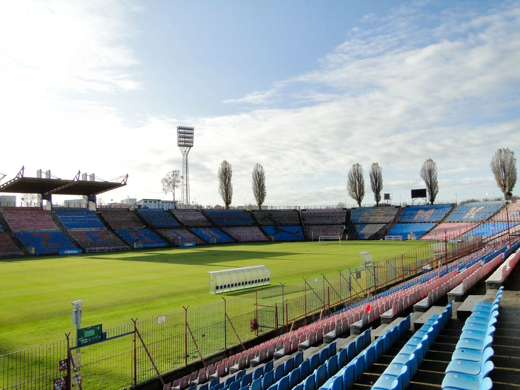 Stadion piłkarski przy ul. Twardowskiego w Szczecinie